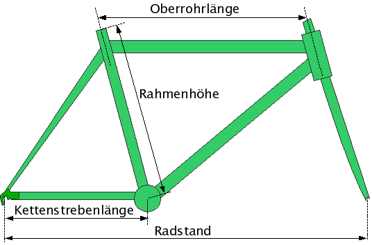 Das Bild zeigt die Längenmaße der einzelnen Rohre eines Fahrrad-Diamantrahmens Bild wurde mit Draw selbst erstellt Erstellt von: Bernd Gutmann